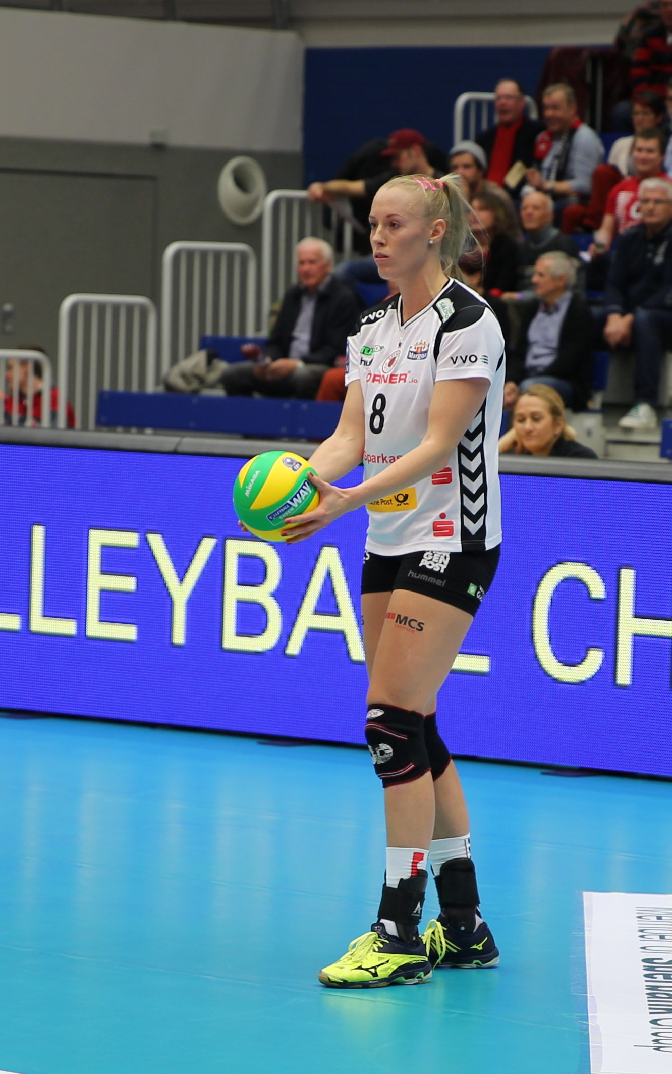 Barbora Purchartová, Dresdner SC